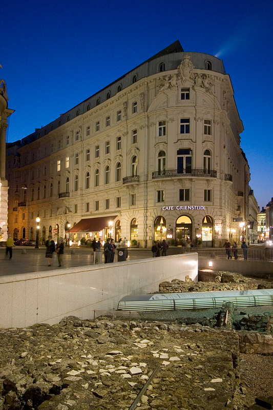 Cafe Griensteidl, Michaelerplatz, Wien